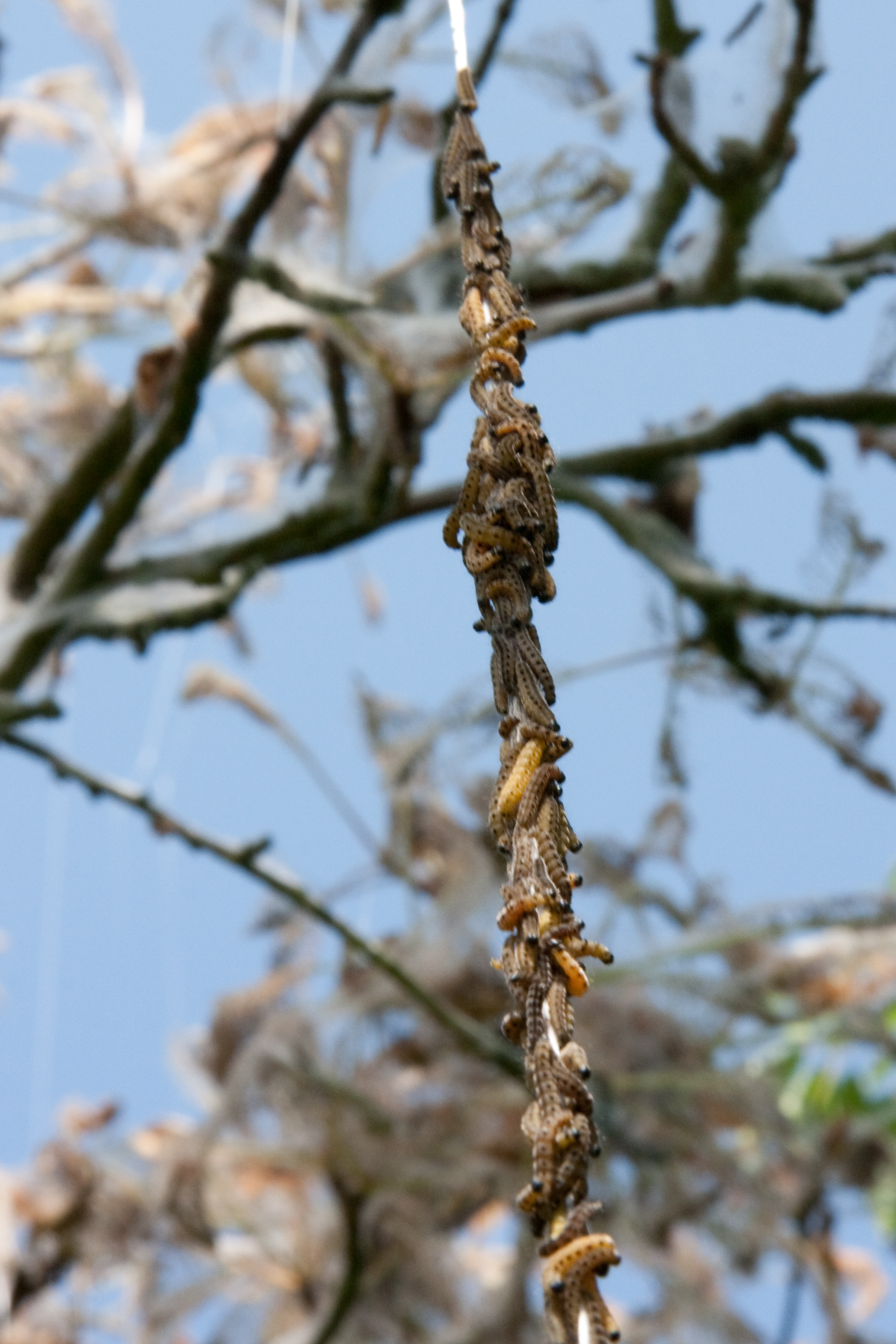 Ein von Raupen der Apfel-Gespinstmotte (Yponomeuta malinellus) befallener Apfelbaum.